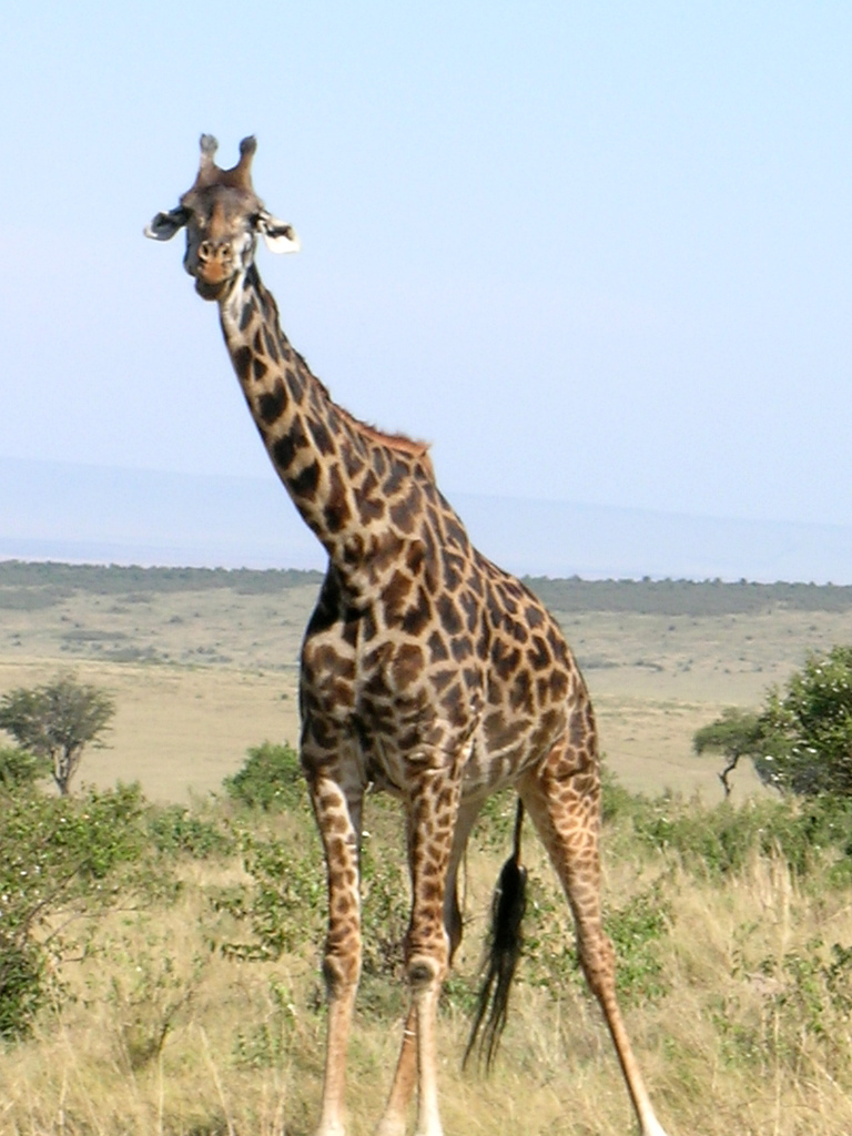 Girafe; Giraffa camelopardalis.